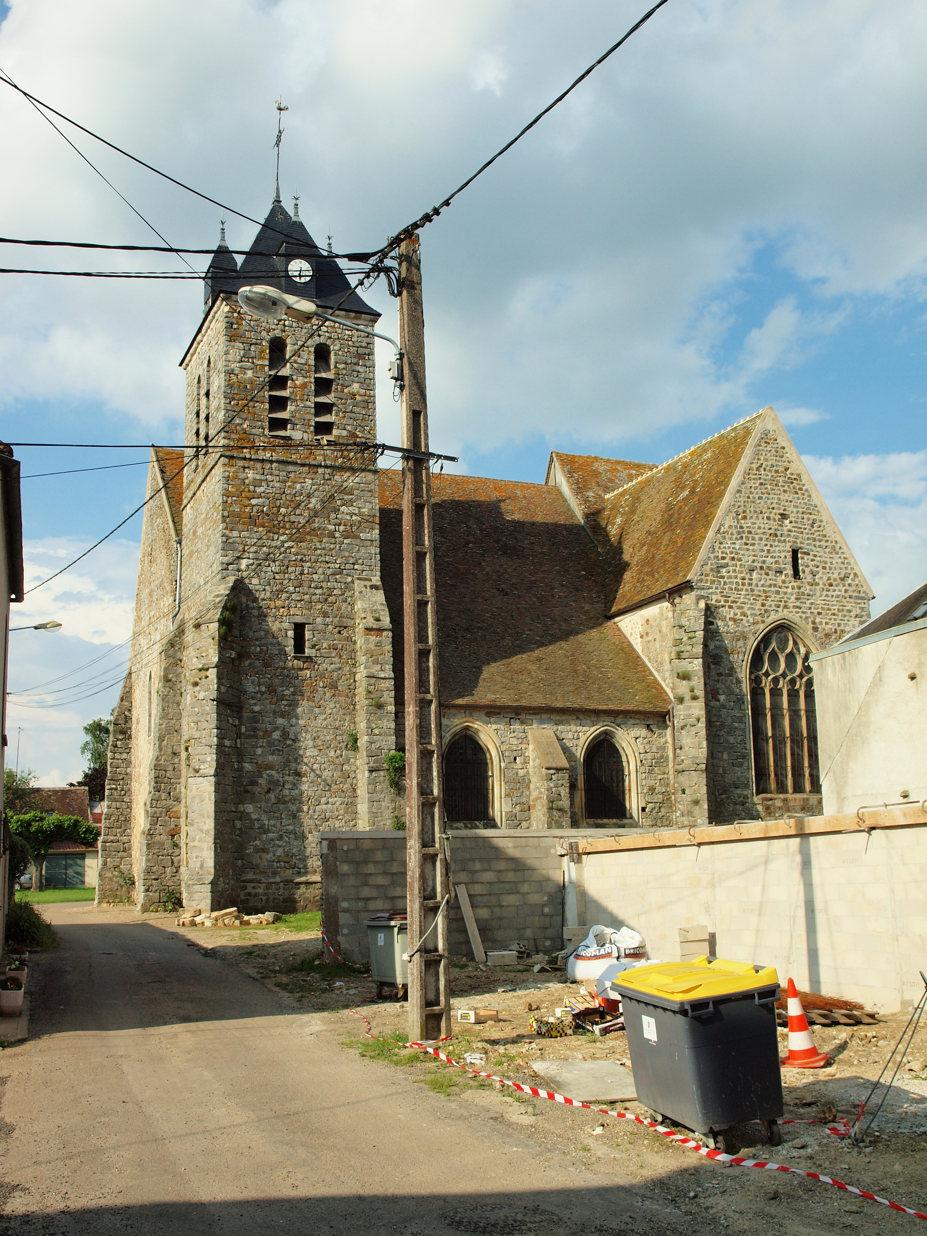 Église Saint-Loup de Villethierry (Yonne, France)